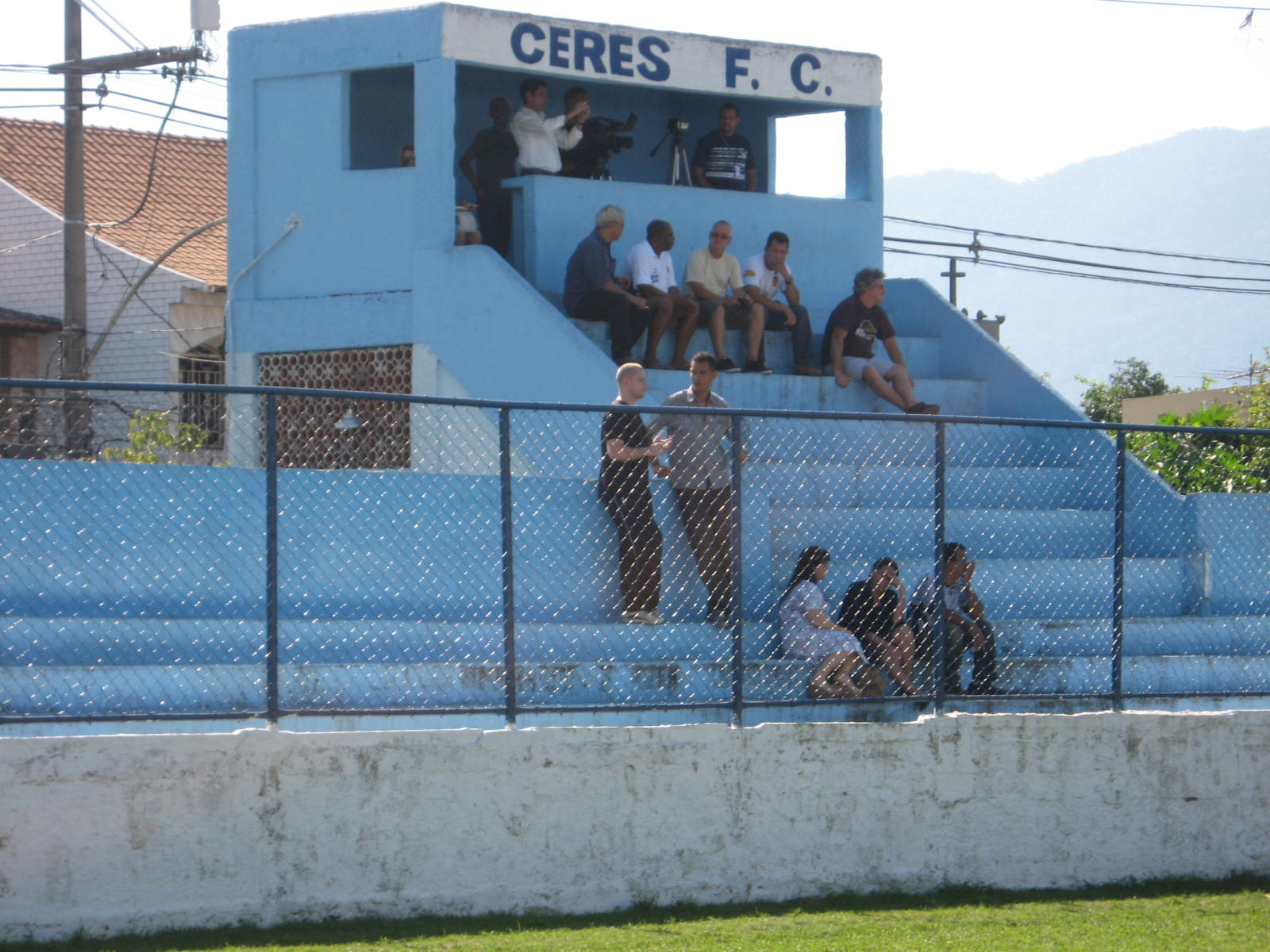 Arquibancadas do estádio João Francisco dos Santos, do Céres FC, em Bangu.